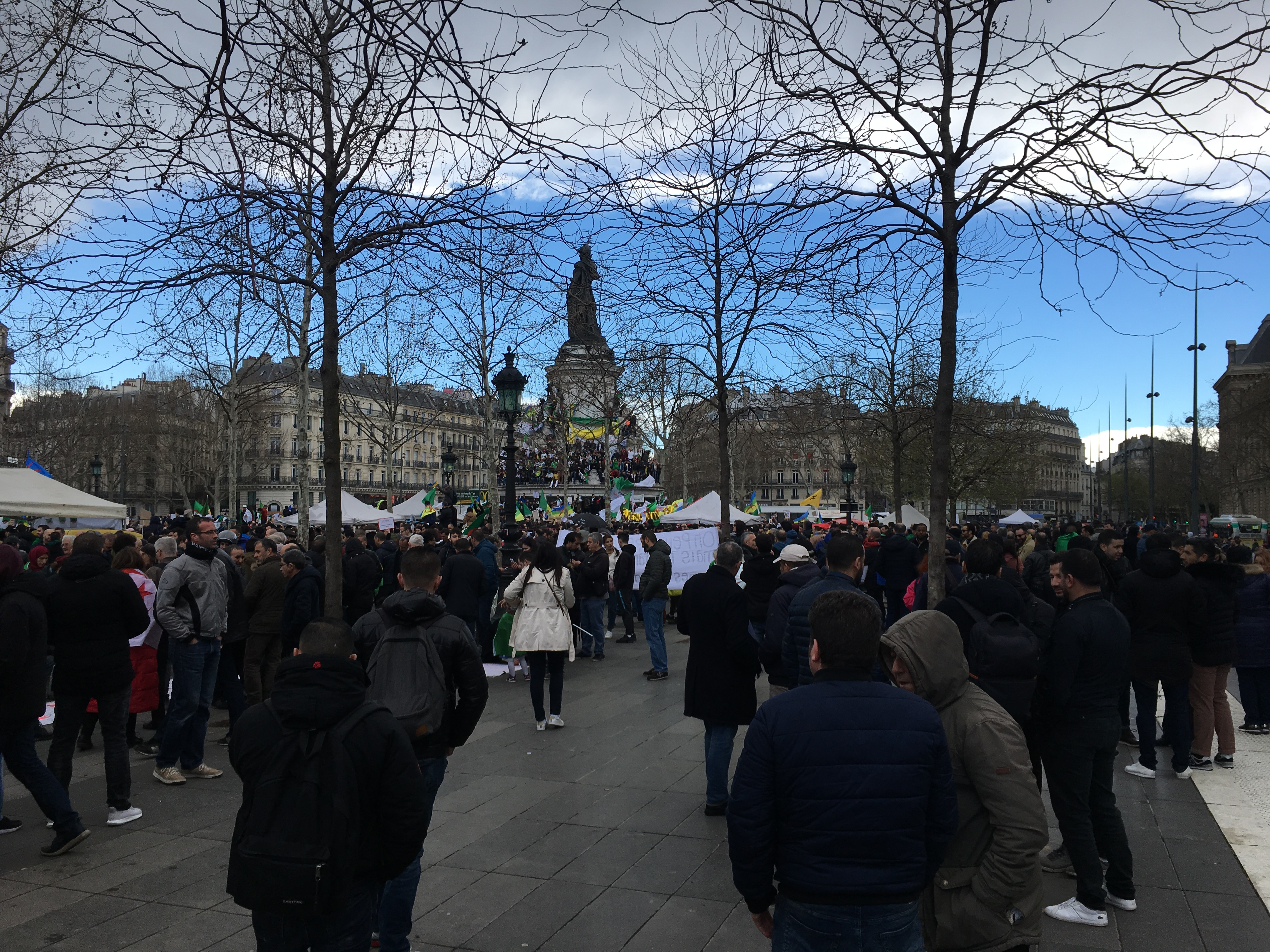 Manifestation anti-Bouteflika à Paris, le 17 mars 2019.